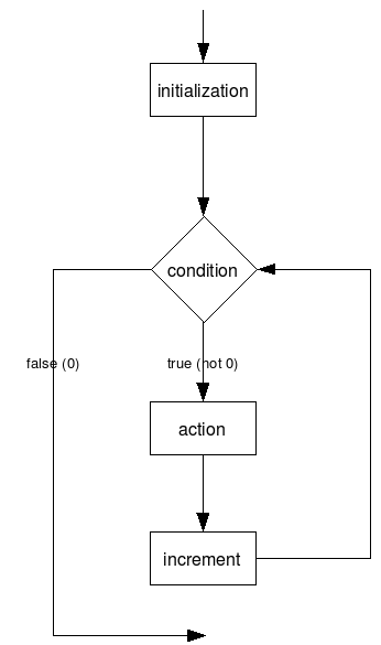 C language example. Illustrates for control statement. See discussion !